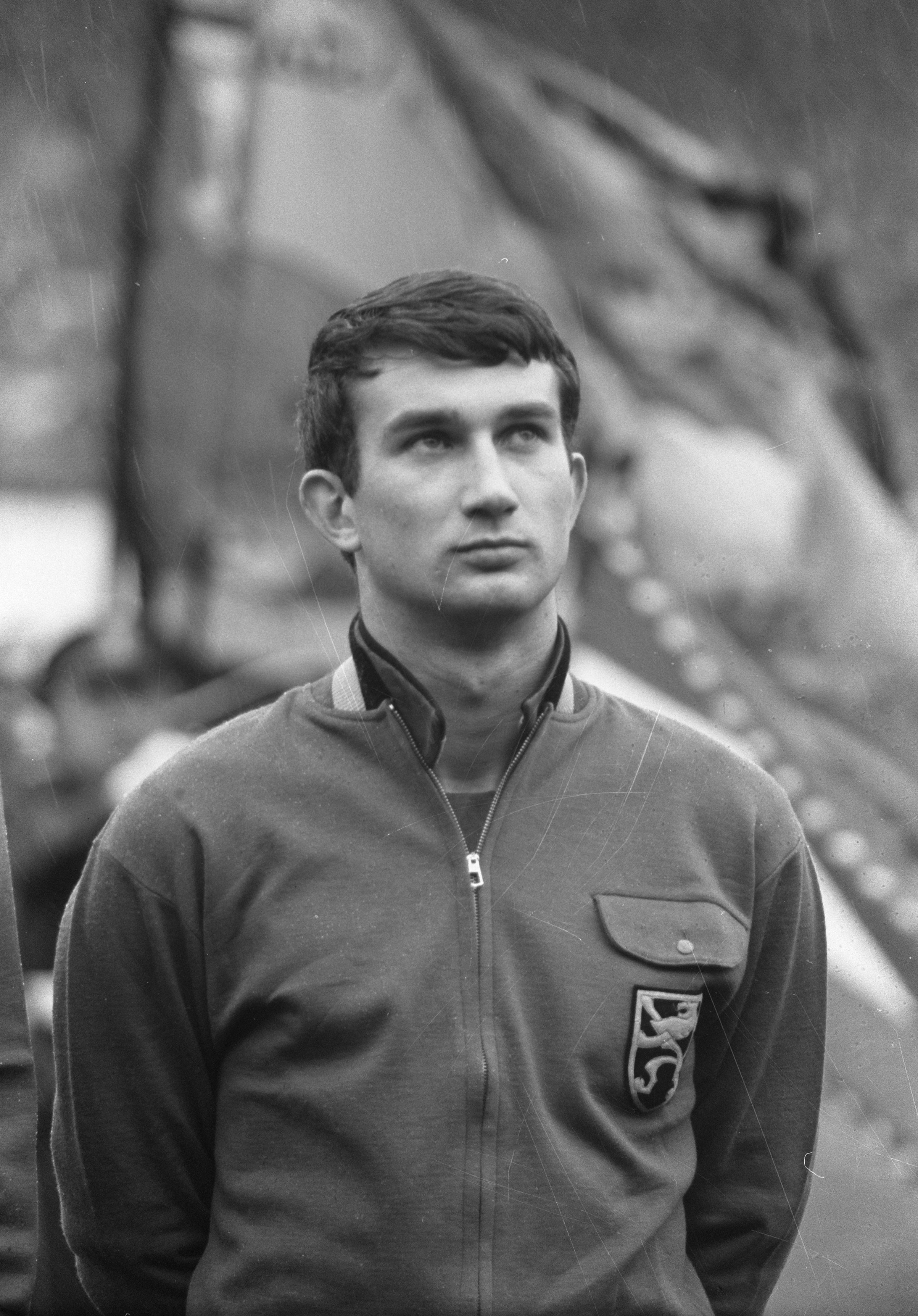 Collectie / Archief : Fotocollectie Anefo Reportage / Serie : [ onbekend ] Beschrijving : Belgie tegen Nederland. Claesen (België) Datum : 1 april 1962 Trefwoorden : portretten, sport, voetbal, voetballers Fotograaf : Pot, Harry / Anefo Auteursrechthebbende : Nationaal Archief Materiaalsoort : Negatief (zwart/wit) Nummer archiefinventaris : bekijk toegang 2.24.01.05 Bestanddeelnummer : 913-7154